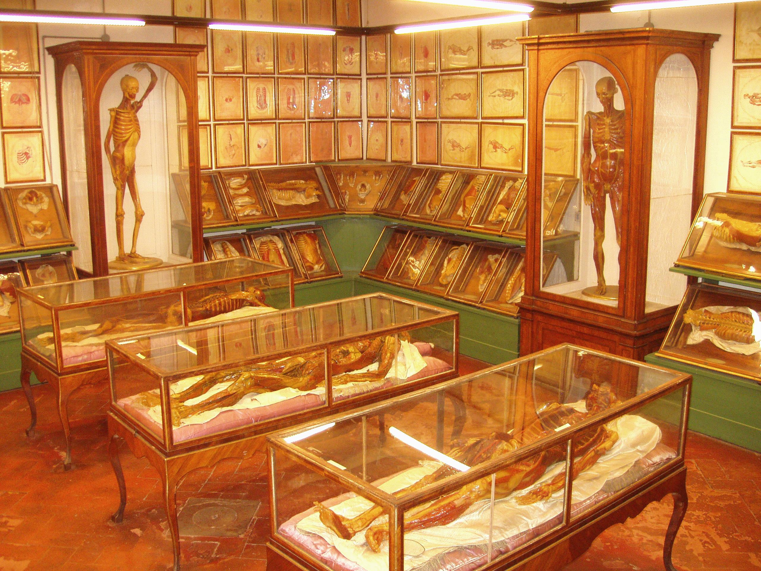 Museo di Storia Naturale di Firenze, Zoologia "La Specola", Florence, Italy. Wax anatomical models.